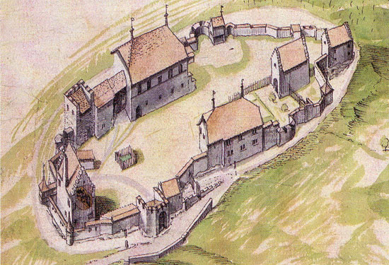 Vogelperspektive des Schlosses Lenzburg aus dem Jahr 1624, gezeichnet vom damaligen Landvogt Joseph Plepp.